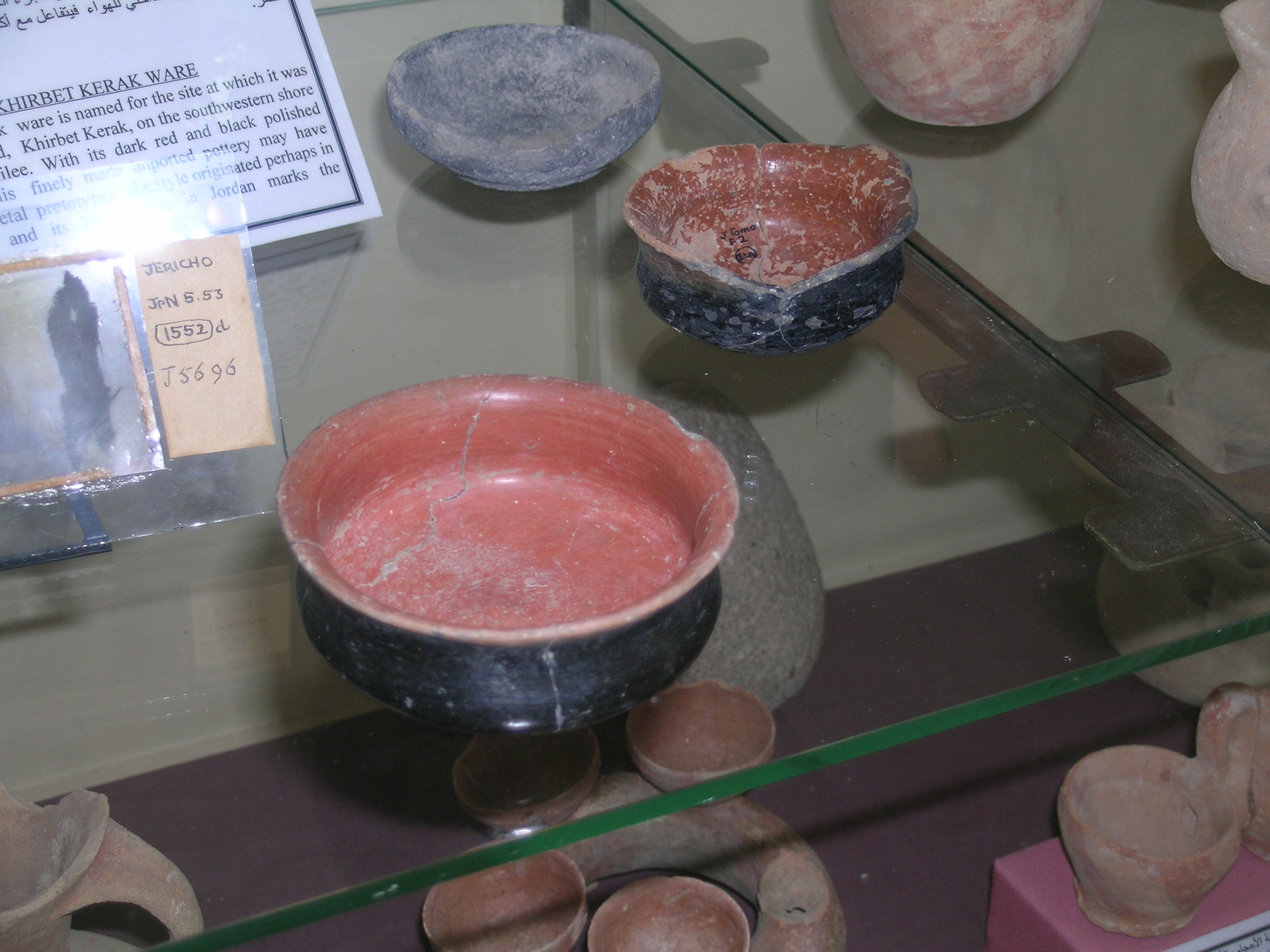 vaso del bronzo antico terzo rinvenuto a kiberth kerak. La foto è stata scattata in un museo a Tel-Aviv